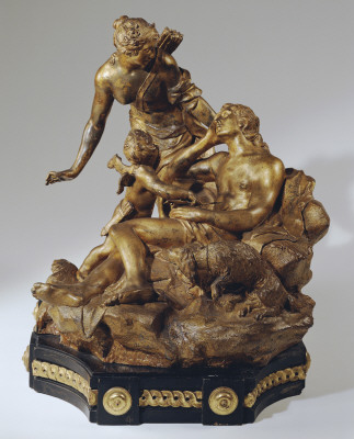 Johann Georg Dorfmeister: Luna und Endymion, 1765, bronziertes Blei, 36 cm